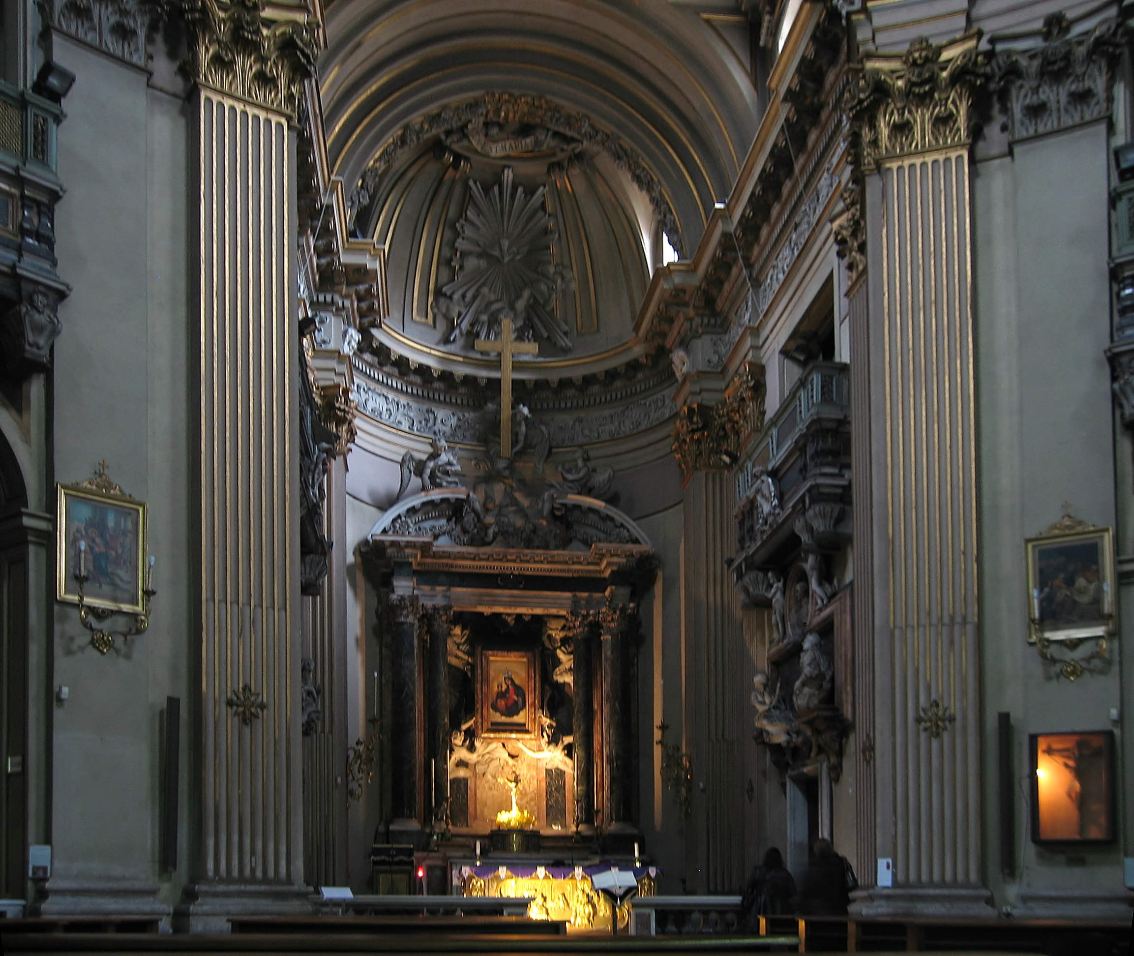 Kirche S. Maria dei Miracoli in Rom/Italien; Apsis